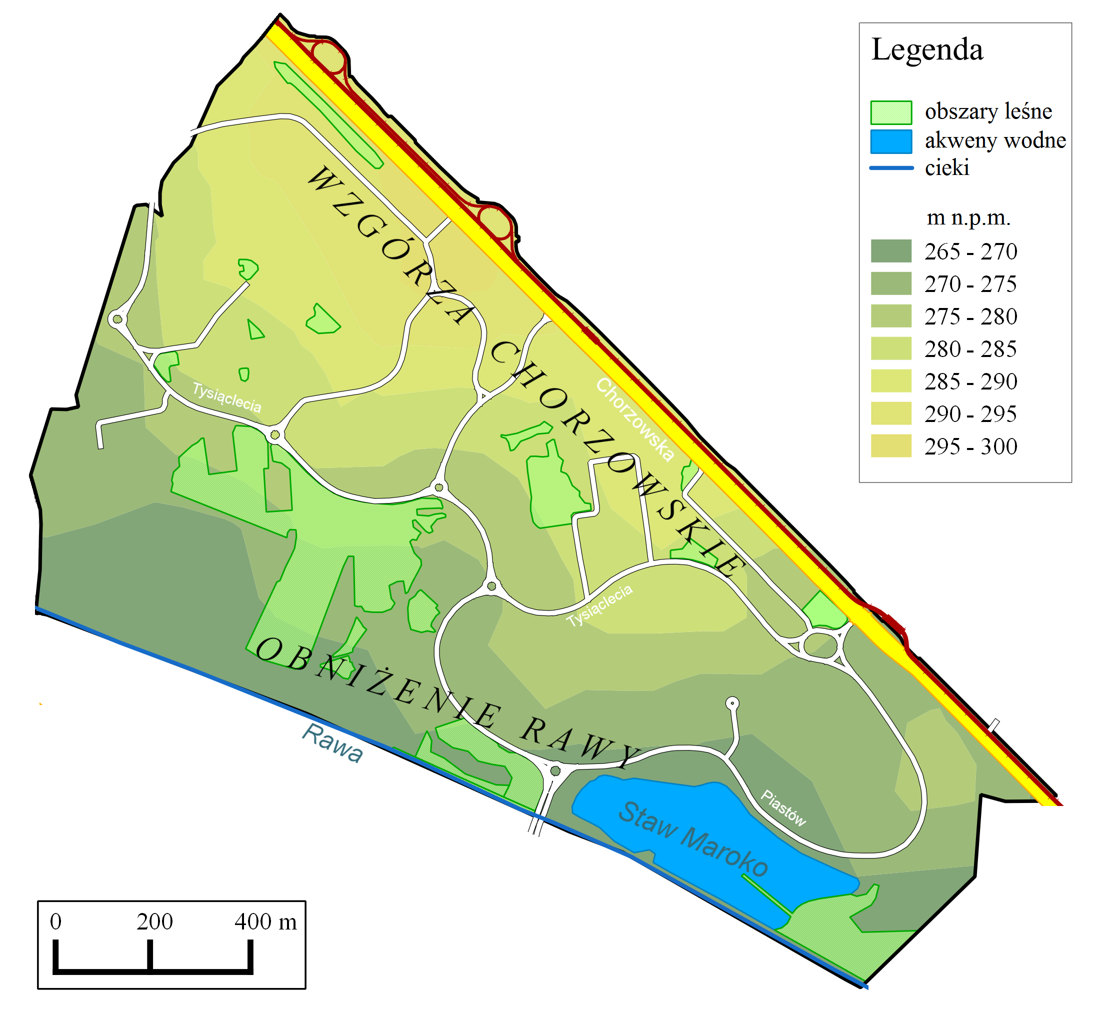 Mapa ogólnogeograficzna dzielnicy Osiedle Tysiąclecie w Katowicach This graphic was created with QGIS